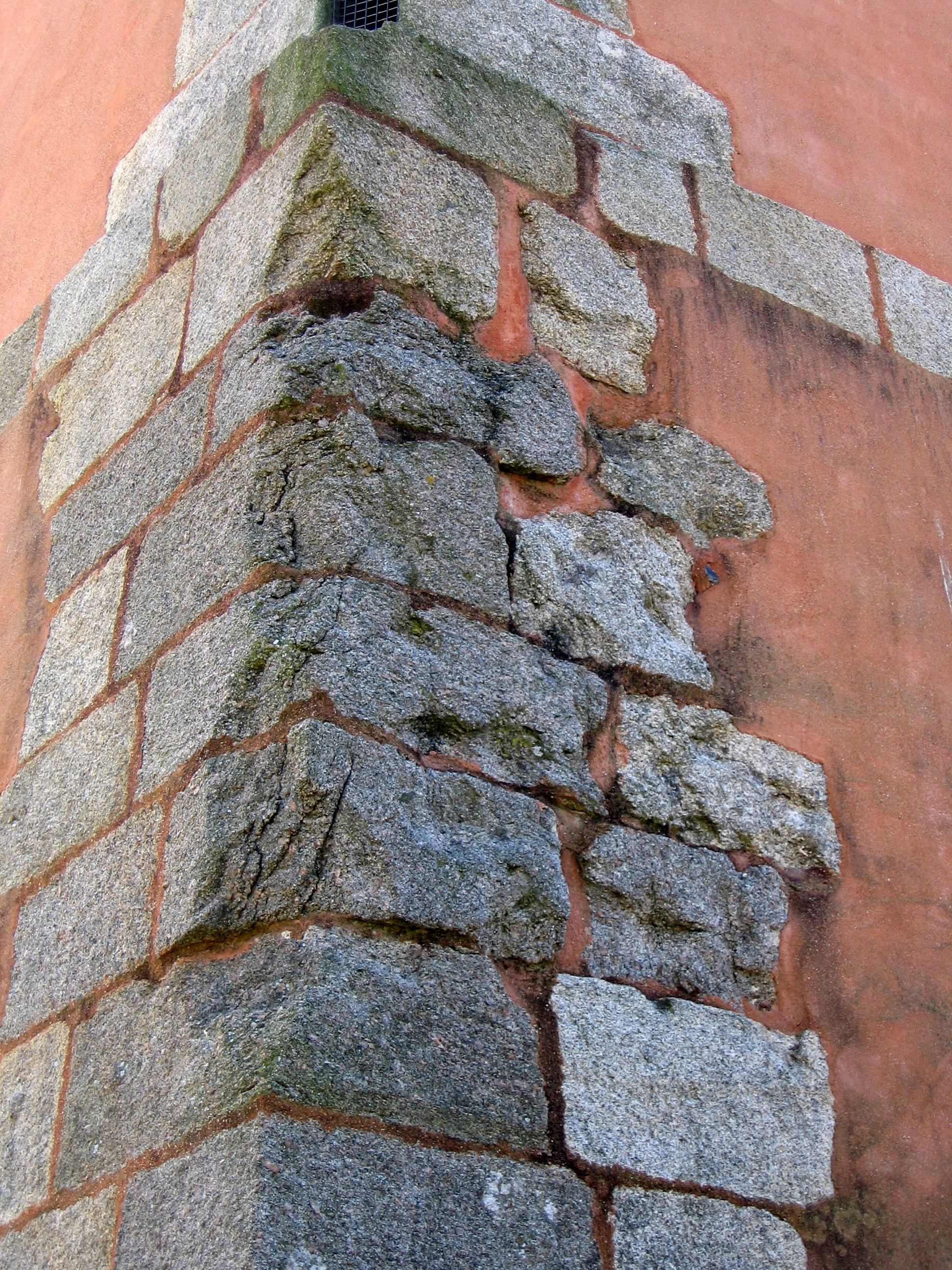 Impacts de boulets tirés par les anglo-hollandais lors de la bataille du 18 juin 1694.